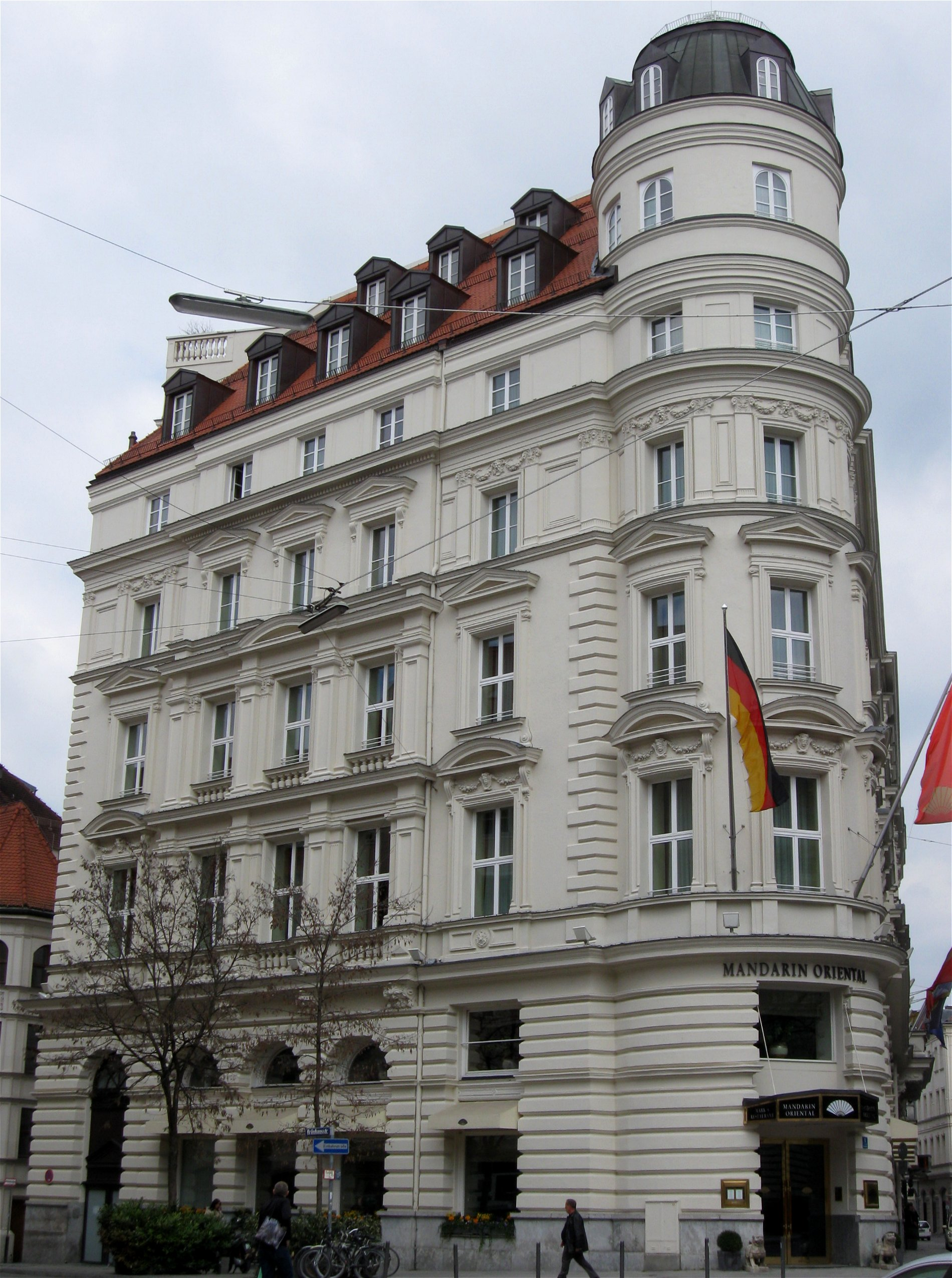 Neuturmstraße 1; Miets- und Geschäftshaus, repräsentativer, langgestreckter Neurenaissance-Eckbau, um 1875/80 von Johann Kilian Stützel; mit Rest der historischen Stadtmauer von 1285-1337 This is a photograph of an architectural monument.